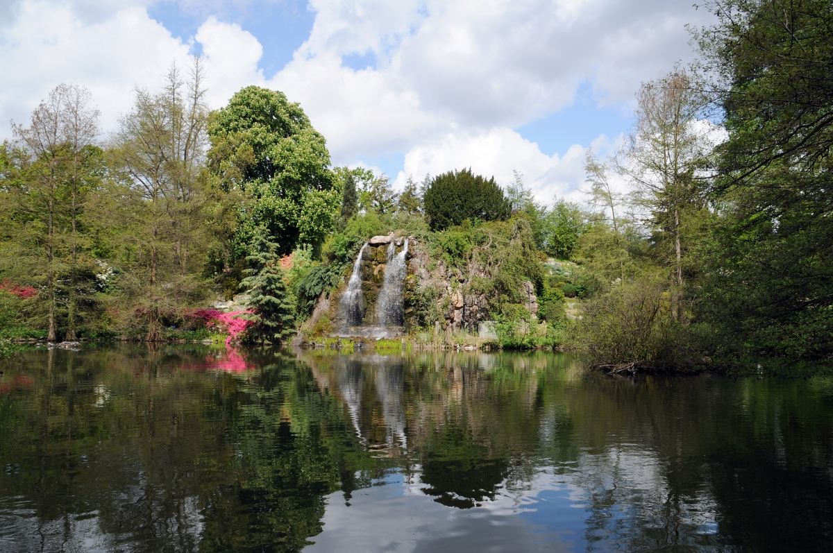 Palmengarten, Frankfurt am Main, Hessen, Deutschland